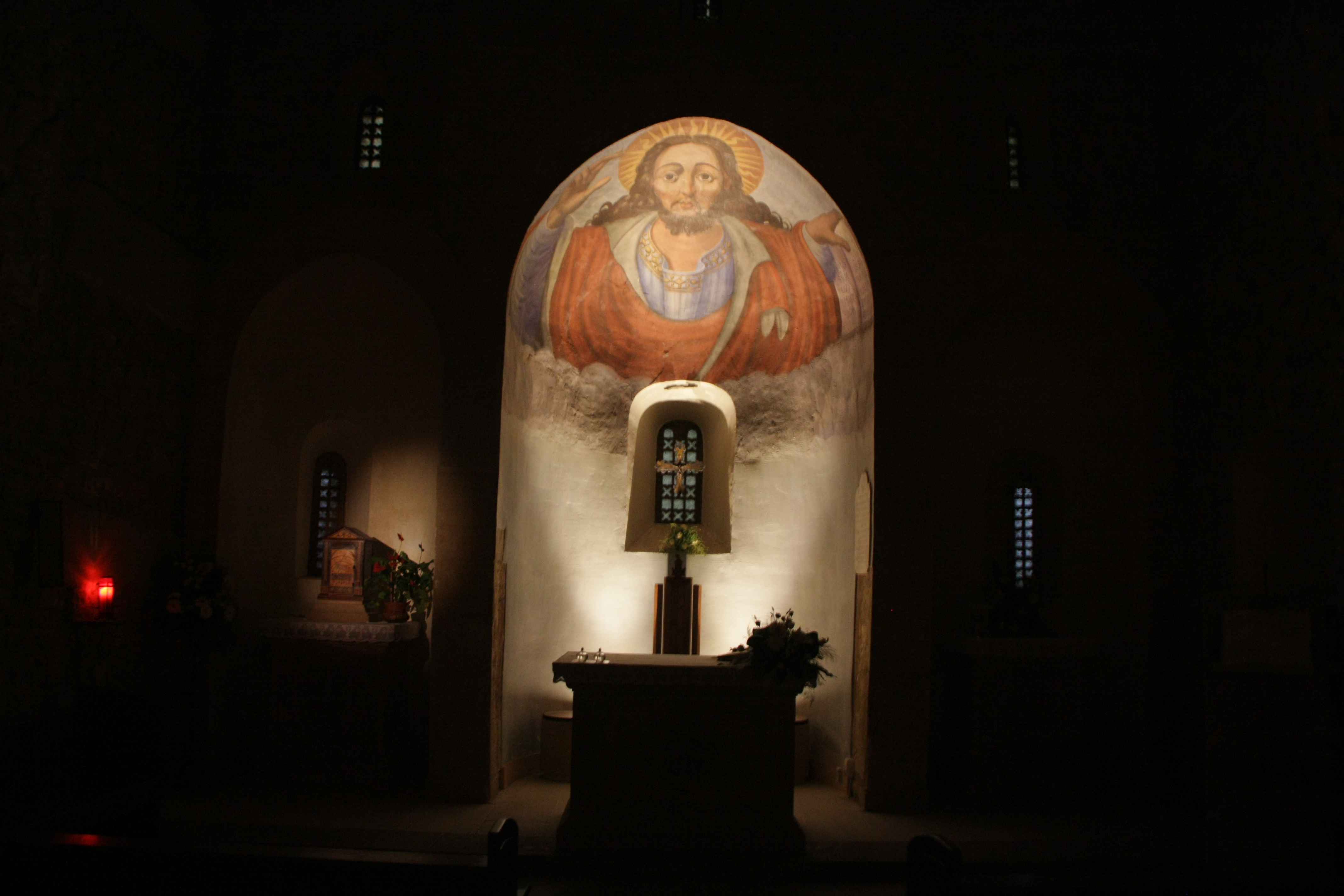 Interni abbazia di Santo Spirito